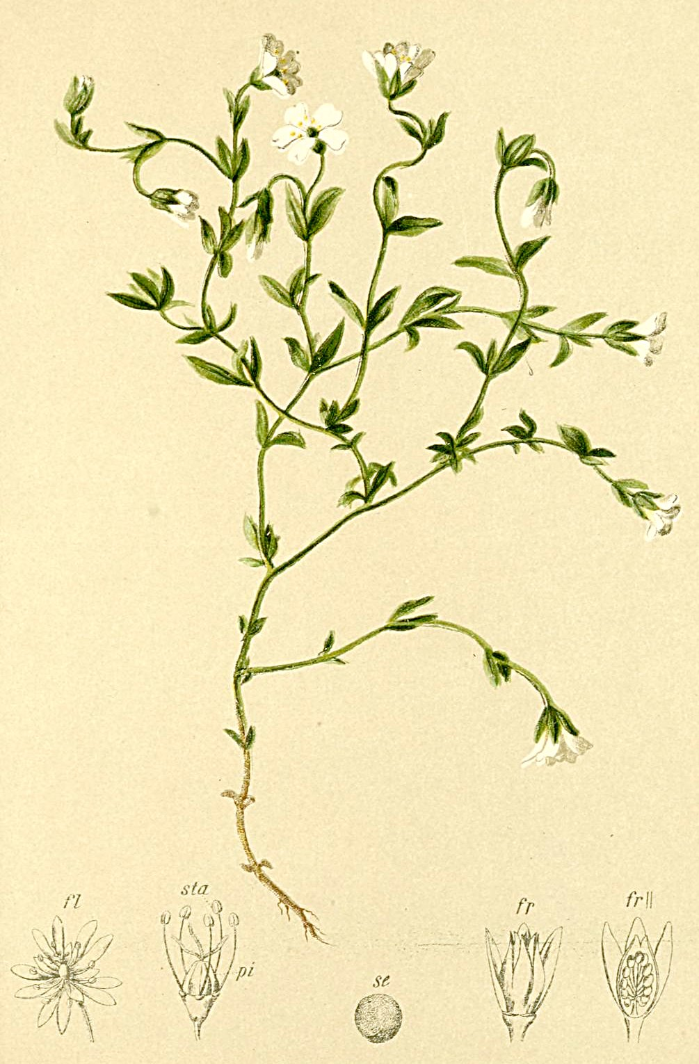 Stellaria ceratioides